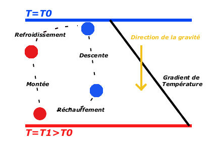 Principe de fonctionnement de la convection thermique. Une particule de fluide situé à la base du fluide est réchauffée au contact de la surface chaude, devient plus légère et remonte sous l'effet de la poussée d'Archimède. Elle arrive à la surface froide, échange sa chaleur et se refroidit. Elle devient alors plus lourde et redescend vers le bas, où elle sera à nouveau réchauffée.